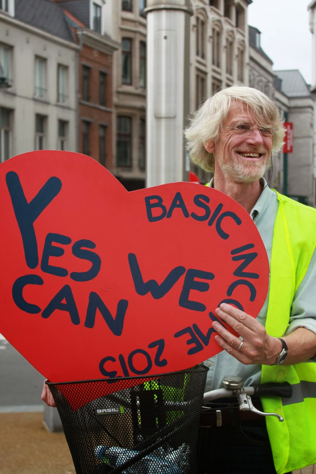 Le philosophe belge Philippe Van Parijs, fondateur du BIEN, fait la promotion de l'initiative citoyenne européenne pour le revenu de base inconditionnel.